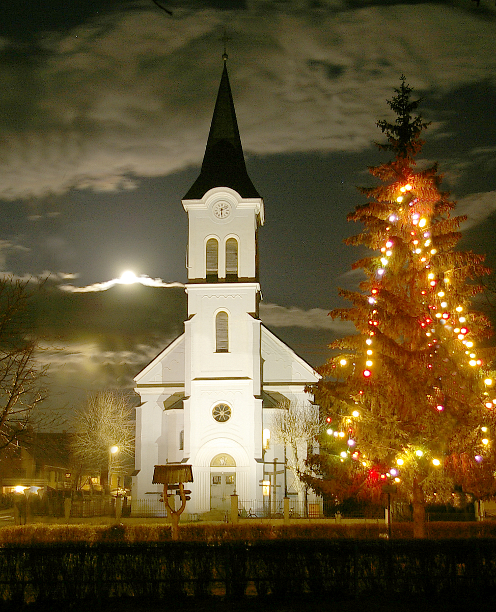 Nočný pohľad na kostol v Krivej